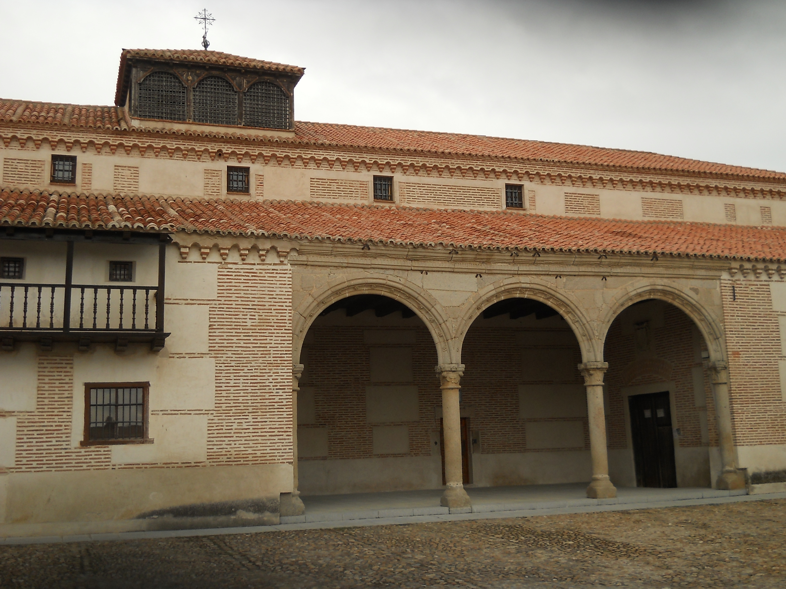 Casa natal de Isabel la Católica, Madrigal de las Altas Torres, Ávila, España